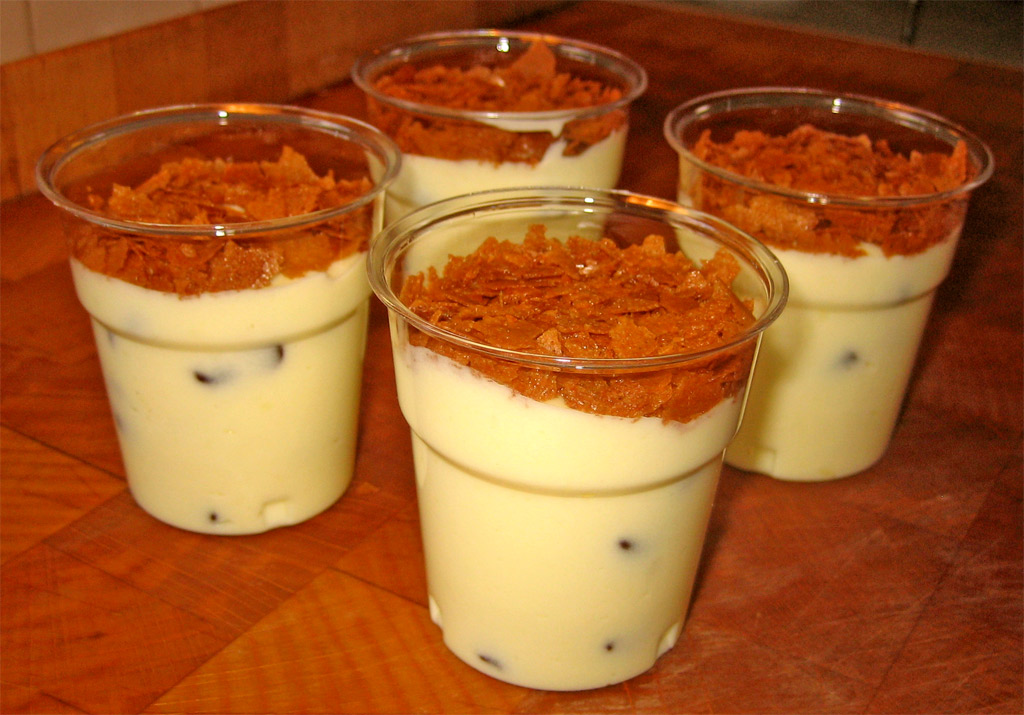 Crema diplomatica